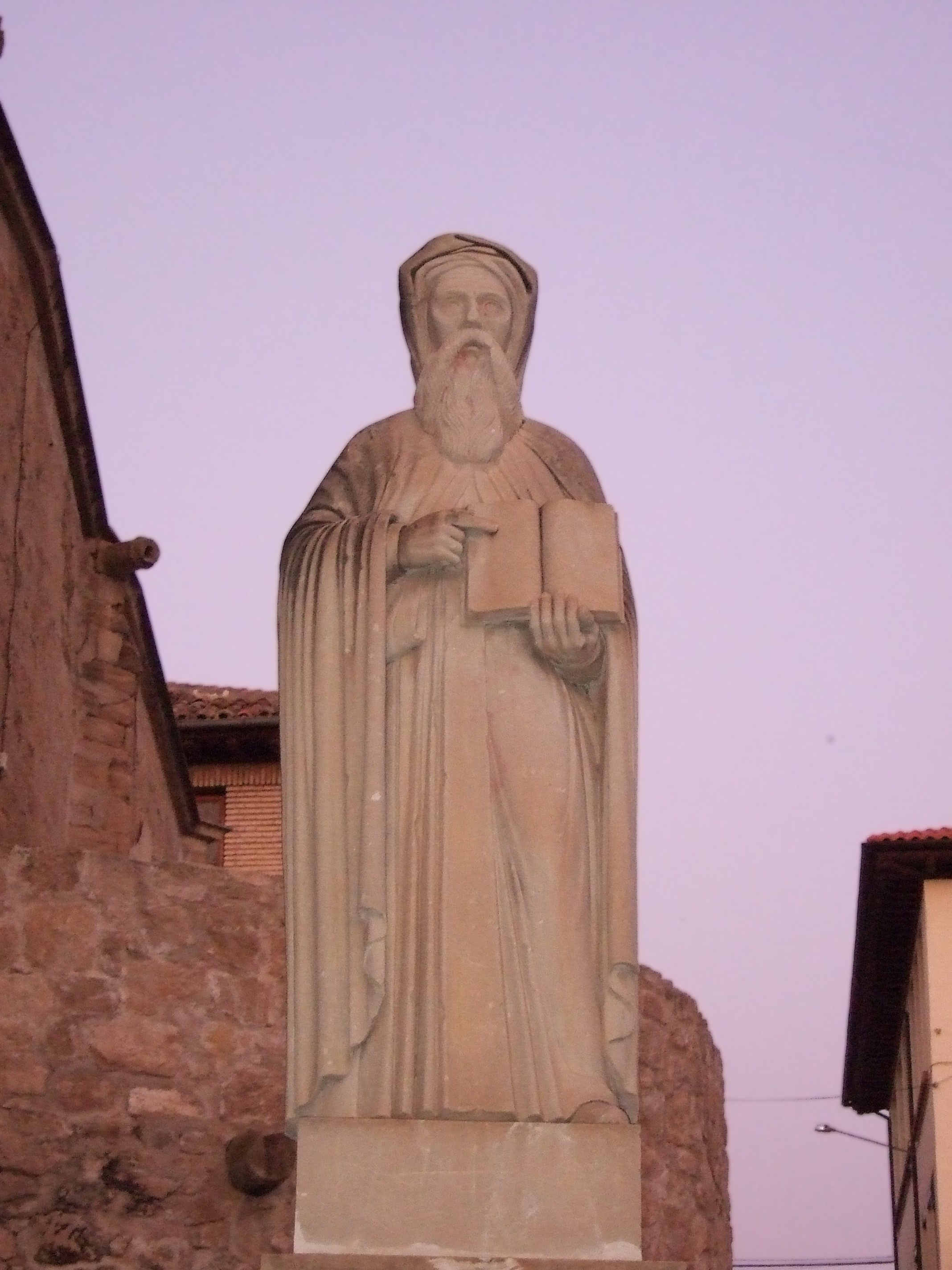 Caspe - Monumento Juan Fernández de Heredia (Munébrega 1310-Avignon 1396). Texto al pie: "Piedra angular de la orden de San Juan del Hospital de Jerusalén, Rodas y Malta, Bailio de Caspe, Gran Maestre de la Orden de 1377 a 1396. Aragonés universal del siglo XIV. Hombre de confianza de varios papas. Brazo fuerte de los Reyes de Aragón. Inteligente arbitro de la cultura europea. Faro y espada del Mediterráneo. Siempre vinculado a Caspe. Del amplio mundo medieval de la Orden eligió esta Villa para su descanso eterno. En recuerdo y homenaje. A.C.R. Resaka - Sanjuanistas de Caspe Ciudad del Compromiso ano 2008."